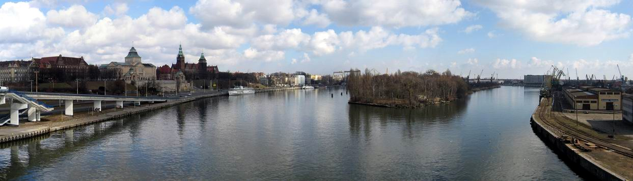 Szczecin, widok na Odrę Zachodnią (po lewej) i Duńczycę (po prawej) z estakady Trasy Zamkowej. Po lewej stronie Wały Chrobrego, na wprost Wyspa Grodzka, po prawej Łasztownia.